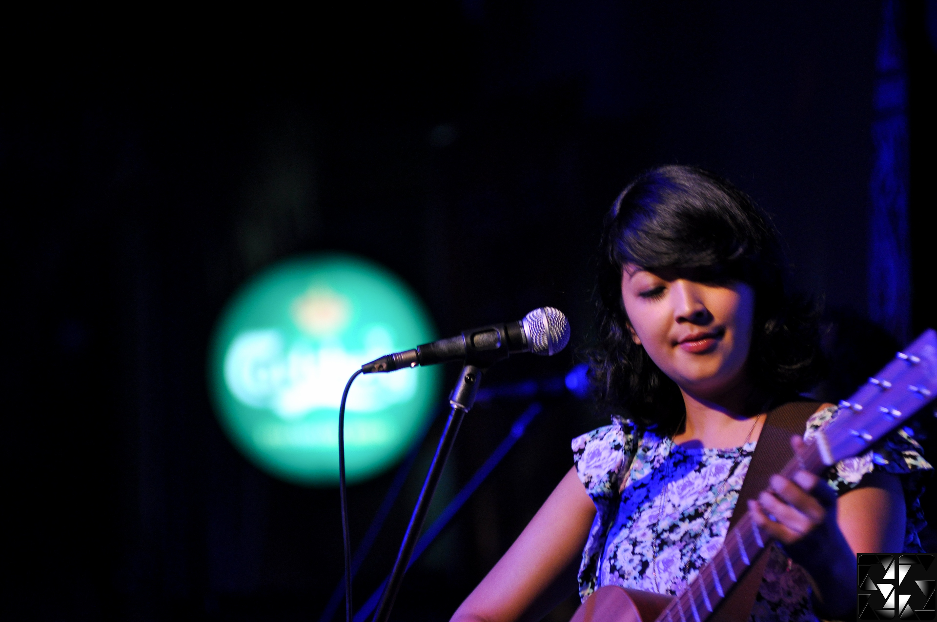 Liyana Fizi in 2010